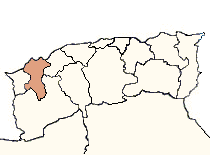 Localisation du département d'Oran, 1962.